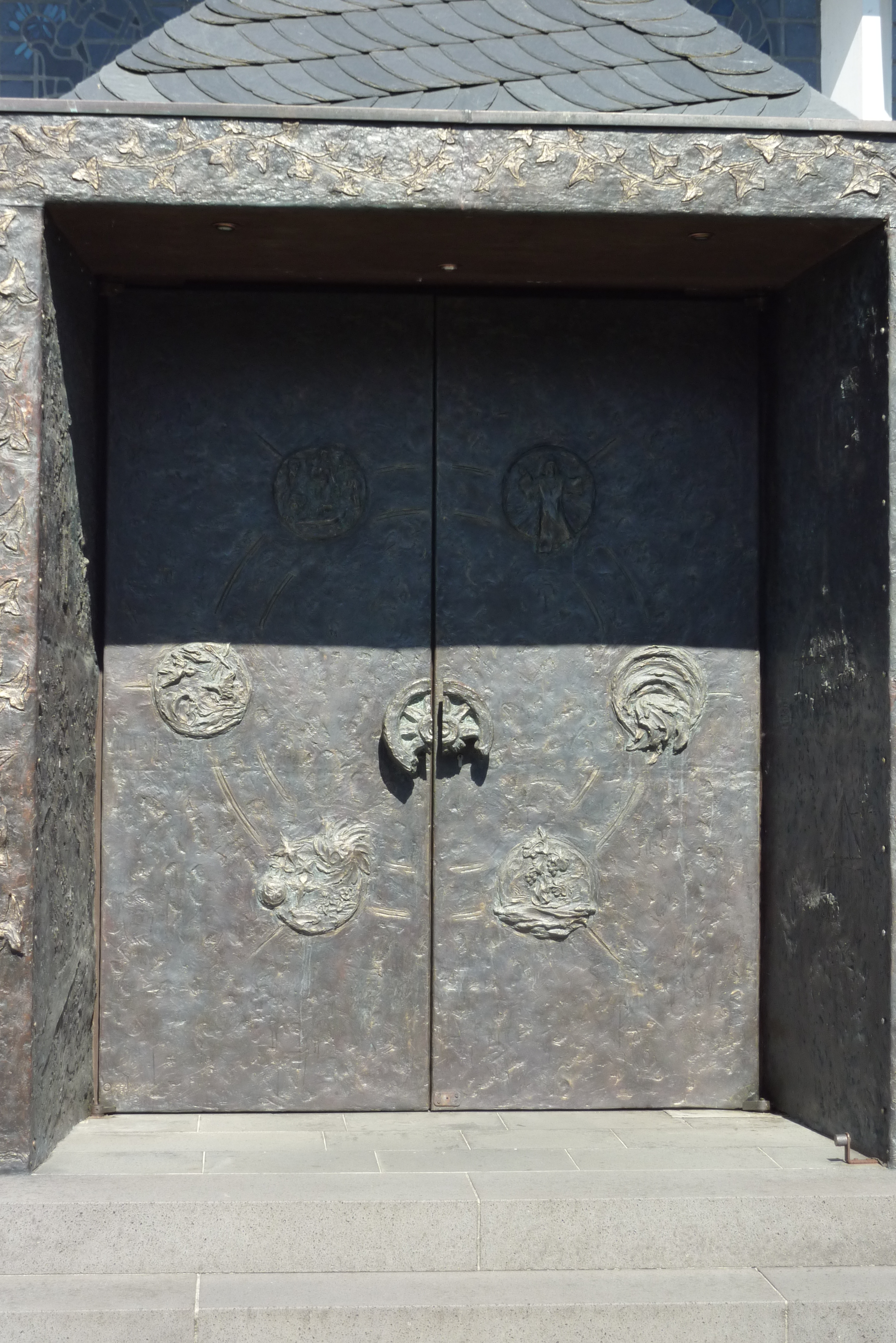 Tür der katholischen Filialkirche St. Katharina in Müsch, das Portal ist aus Bronze gegossen